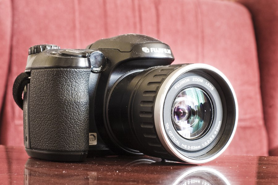 fuji finepix s5600